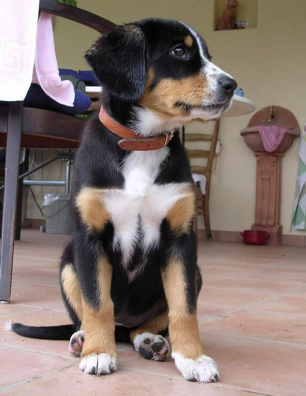 Junge Entlebucher Sennenhündin